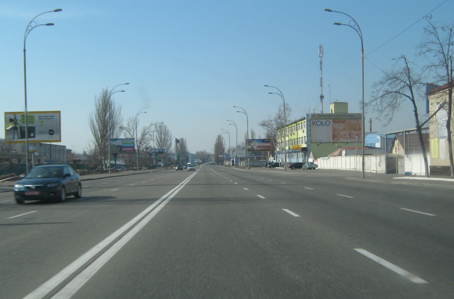 Новокостянтинівська вулиця в Києві